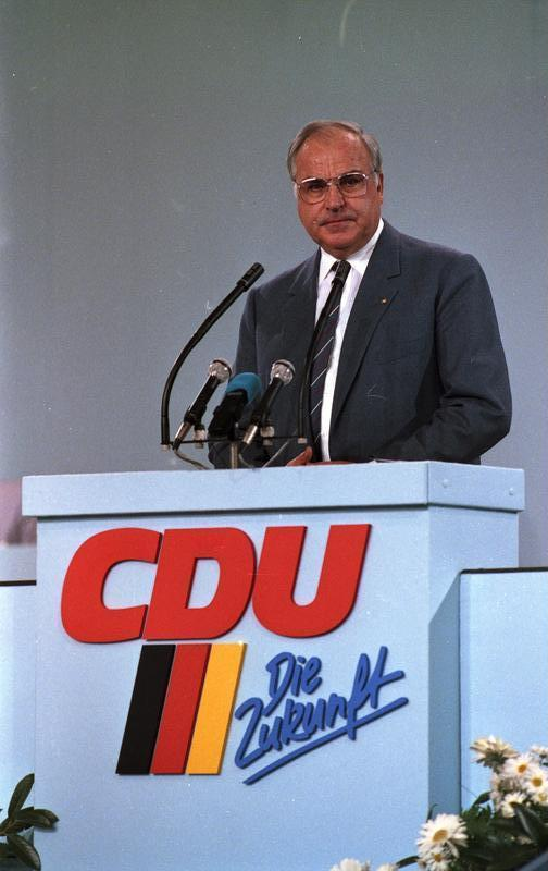 7./8.10.1986 34. Bundesparteitag der CDU in der Rheingoldhalle, Mainz (6.-8.10.1986)